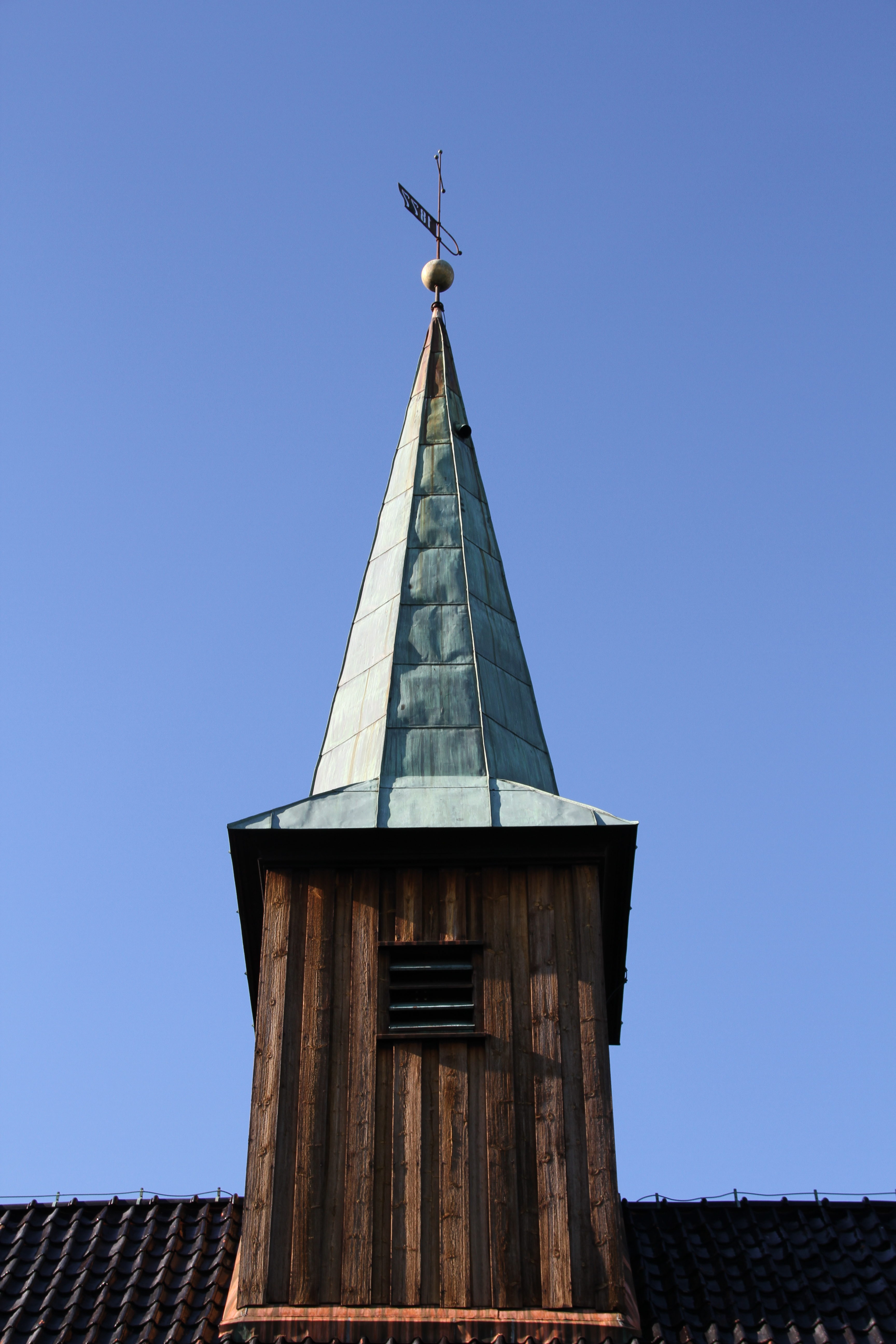 Nesodden kirke, sørøst for tettstedet Nesodden, Akershus.